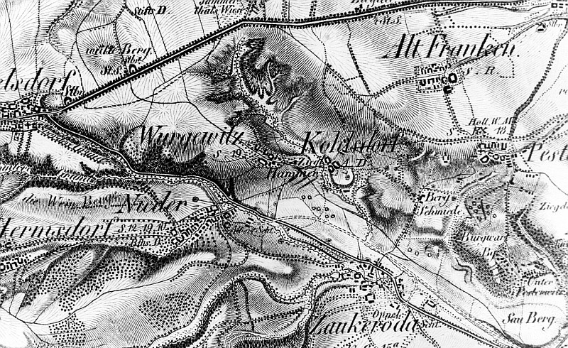 Original image description from the Deutsche Fotothek Freital-Wurgwitz. Oberreit, Sect. Dresden, 1821/22